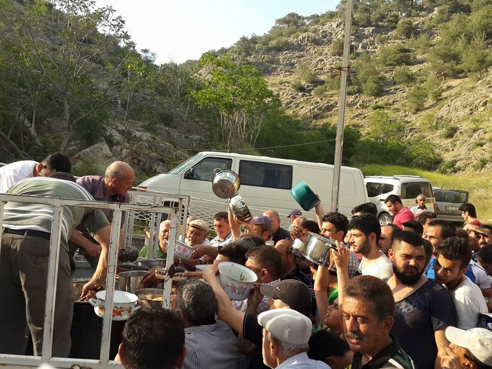 2015 yılı Yağmur Duası etkinliklerinden.